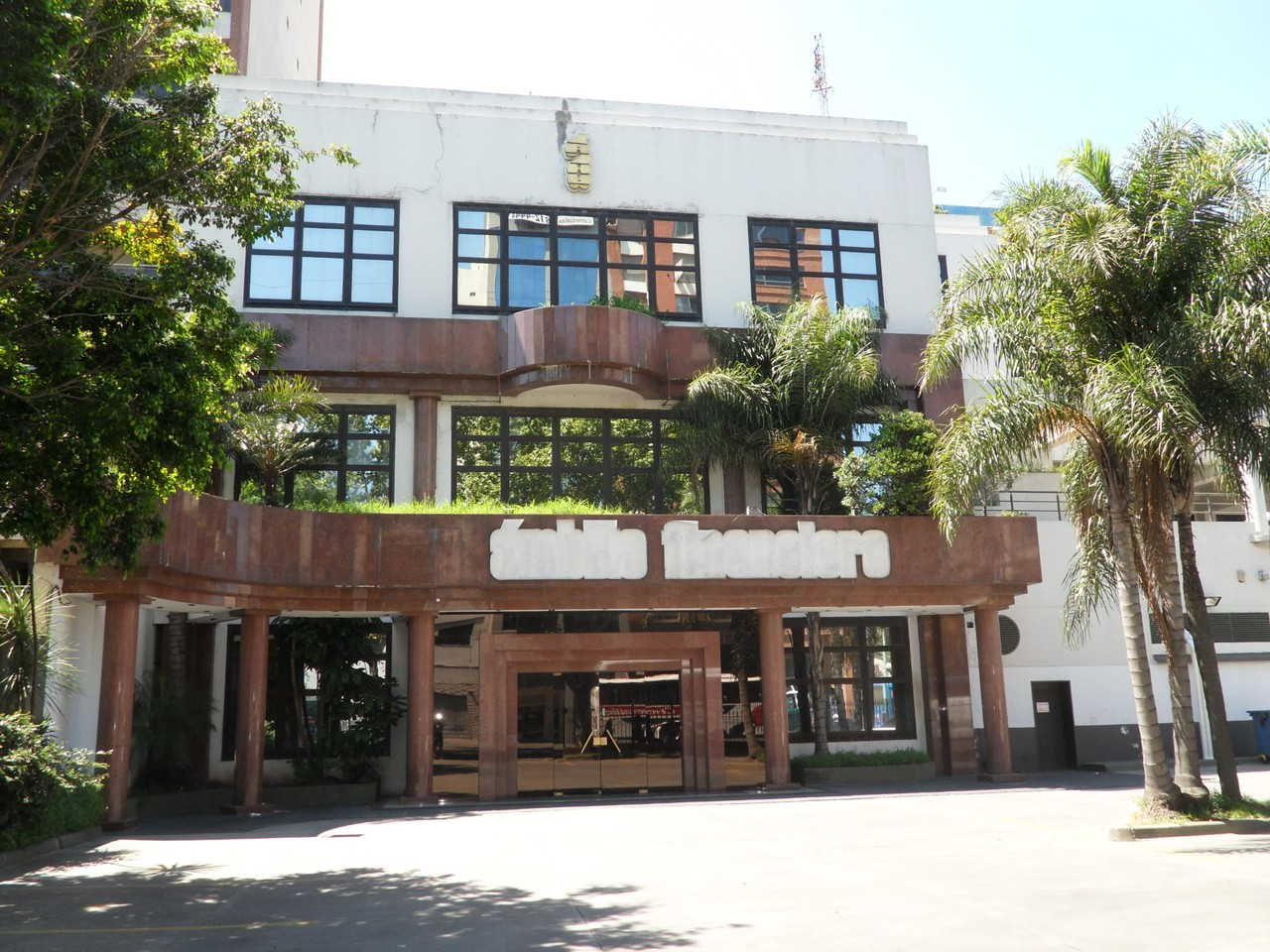 Vista desde Paseo Colón